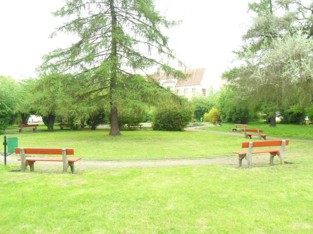 Gubin, Park przy ul. Obrońców Pokoju